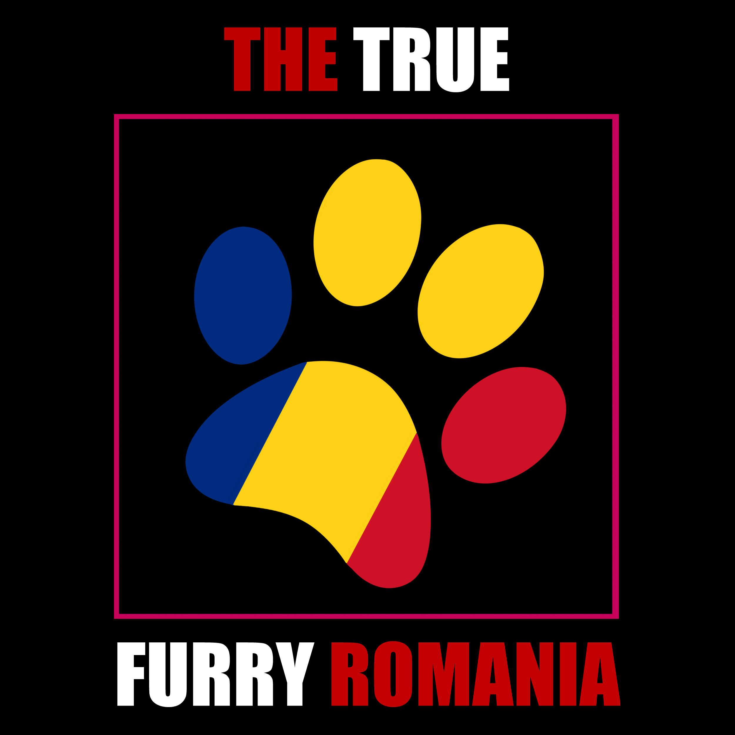 Logo Furry Romania